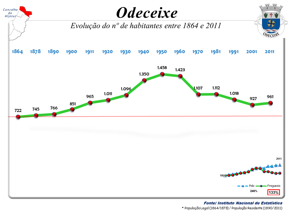 Censos 1864/2011